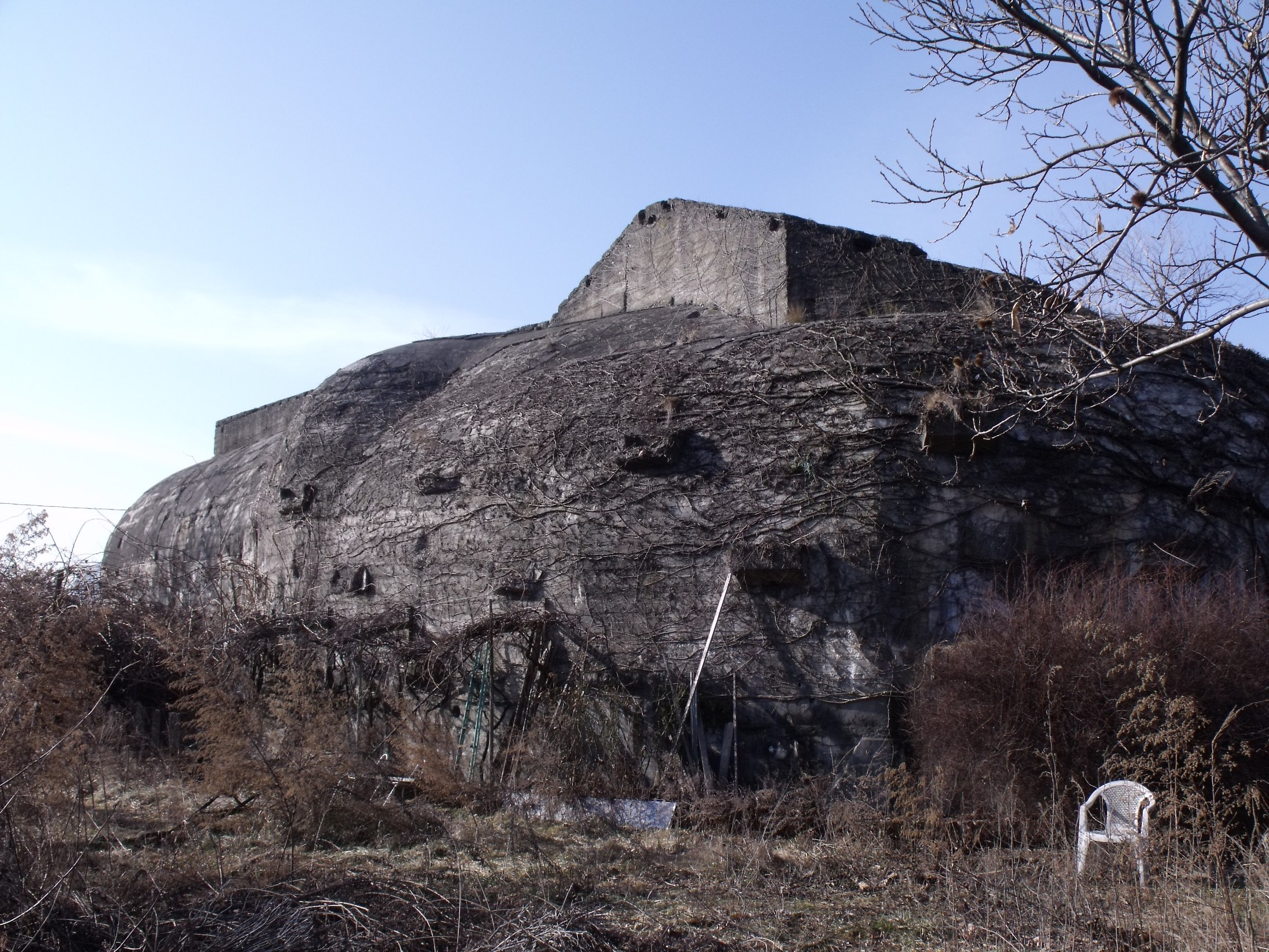 Opera 14, sbarramento Bolzano sud